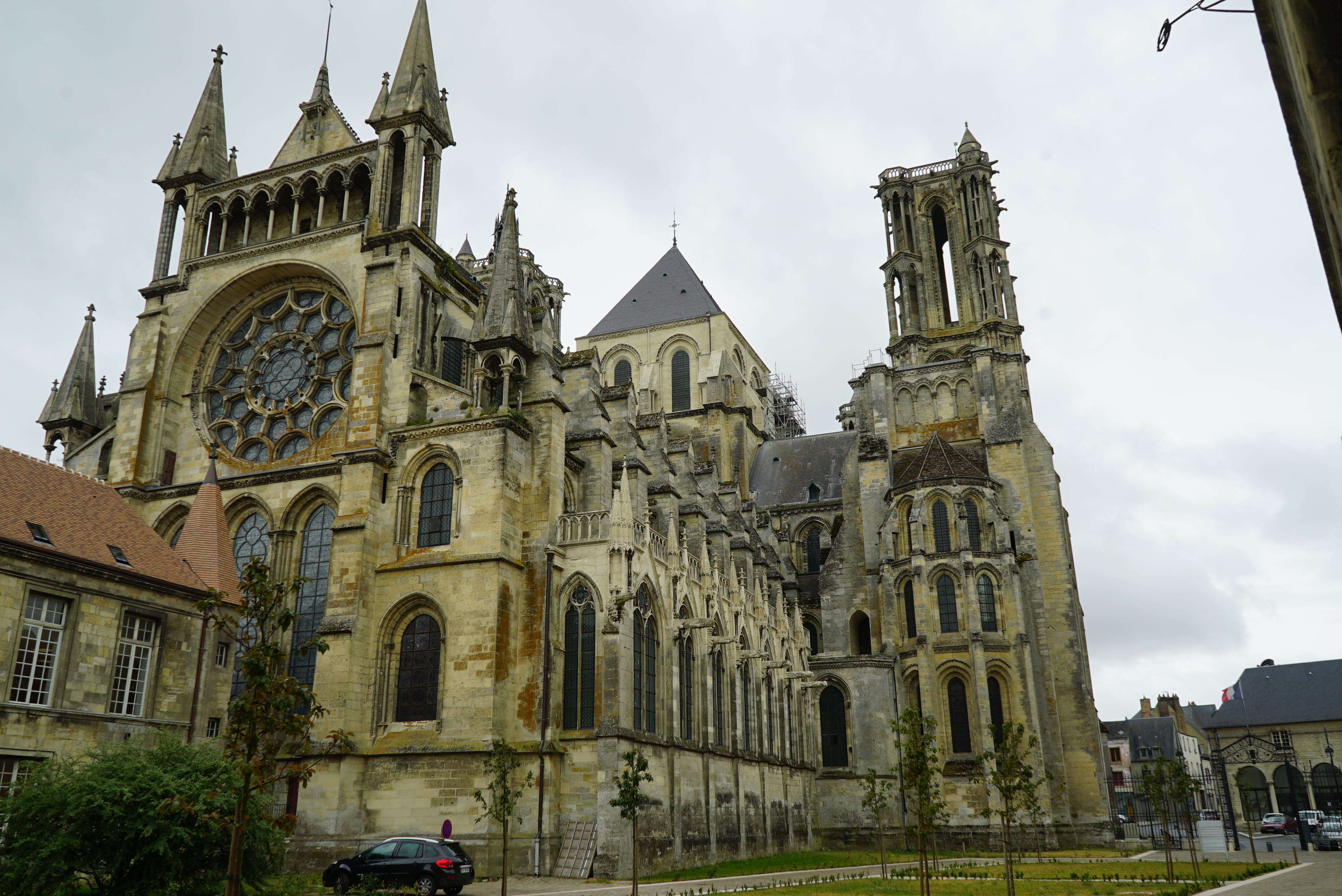 vue du Palais épiscopal de Laon.